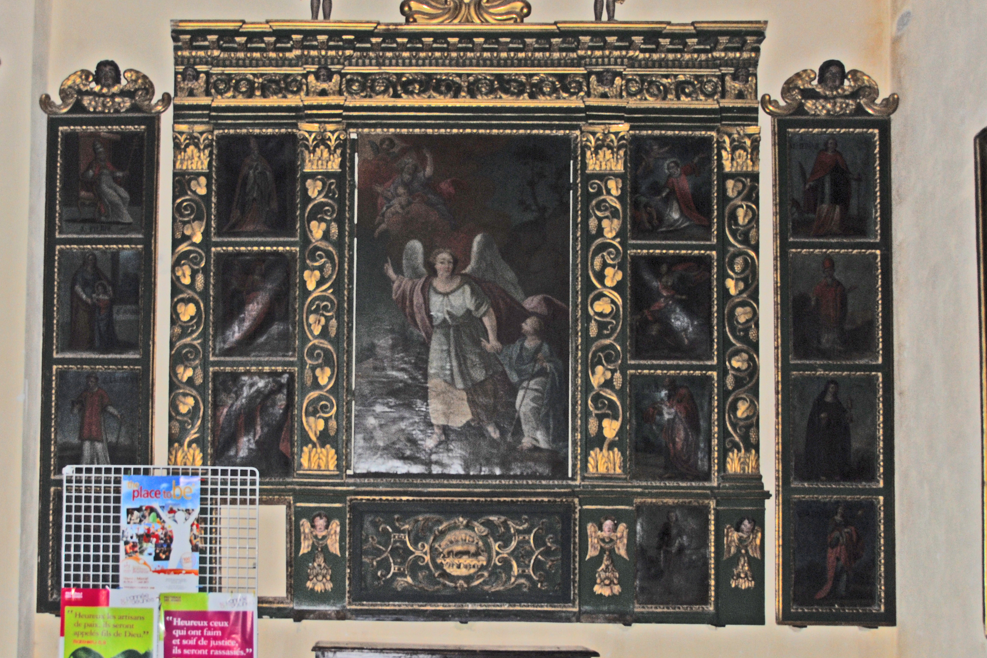 Kathedrale von Vence, Altar in südl. Seitenkapelle